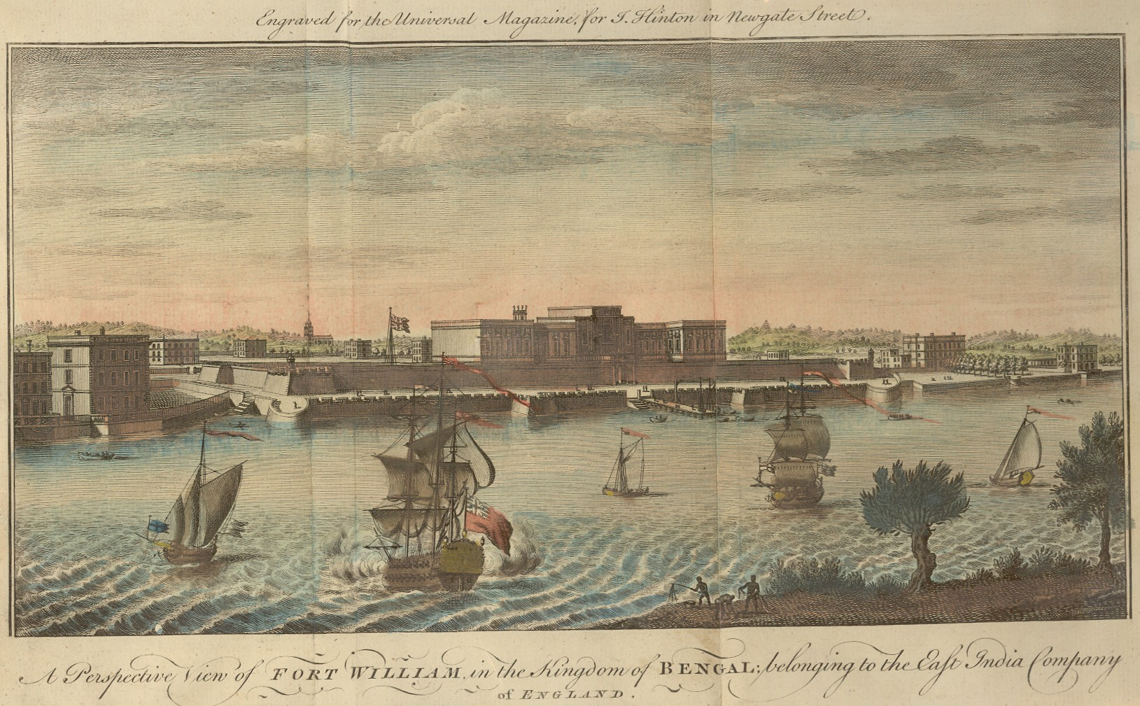 Teckning av Fort William 1760.